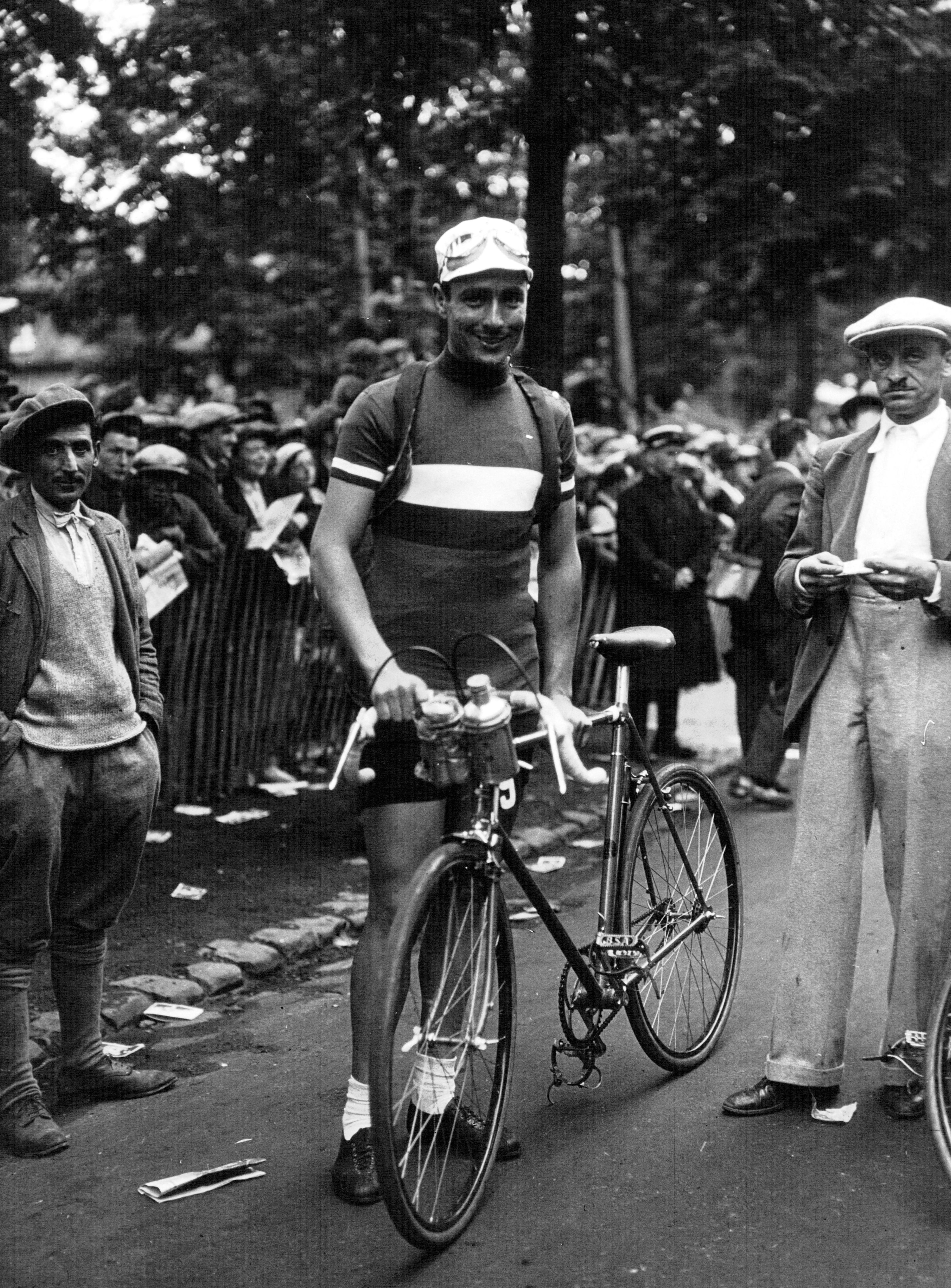 Raffaele Di Paco lors du Tour de France 1932